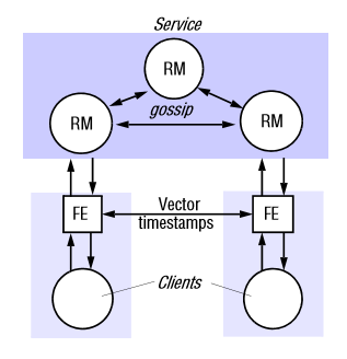 Esquema arquitectura cotilla 1